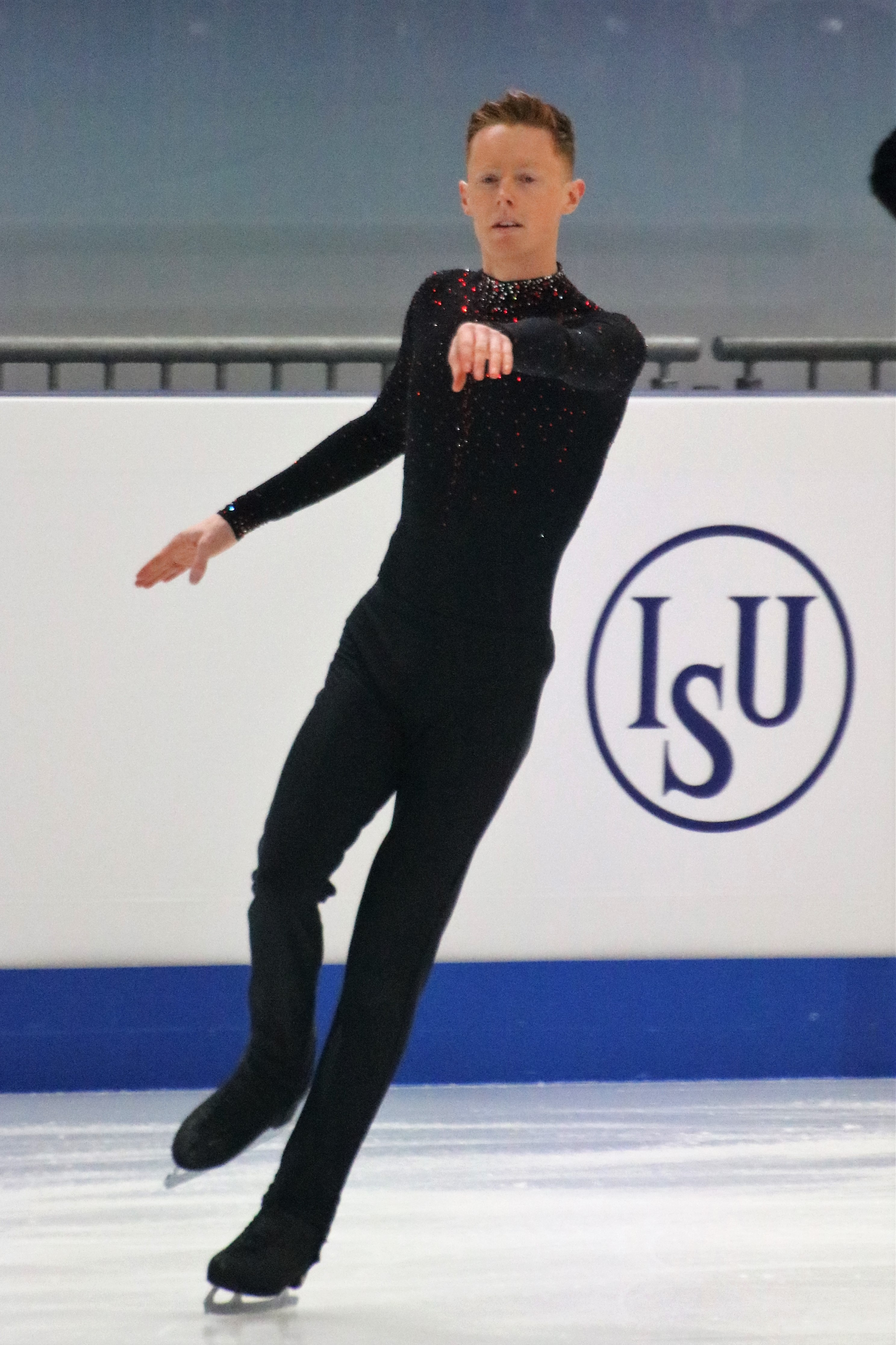 Конор Стакелум (Ирландия) на чемпионате Европы по фигурному катанию 2020